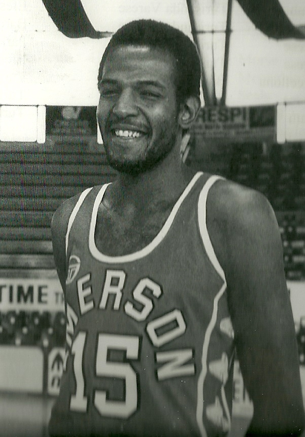 Il cestista Bruce Seals con la maglia della Pallacanestro Varese Licensing Seals, Bruce Categoria:Immagini della Pallacanestro Varese